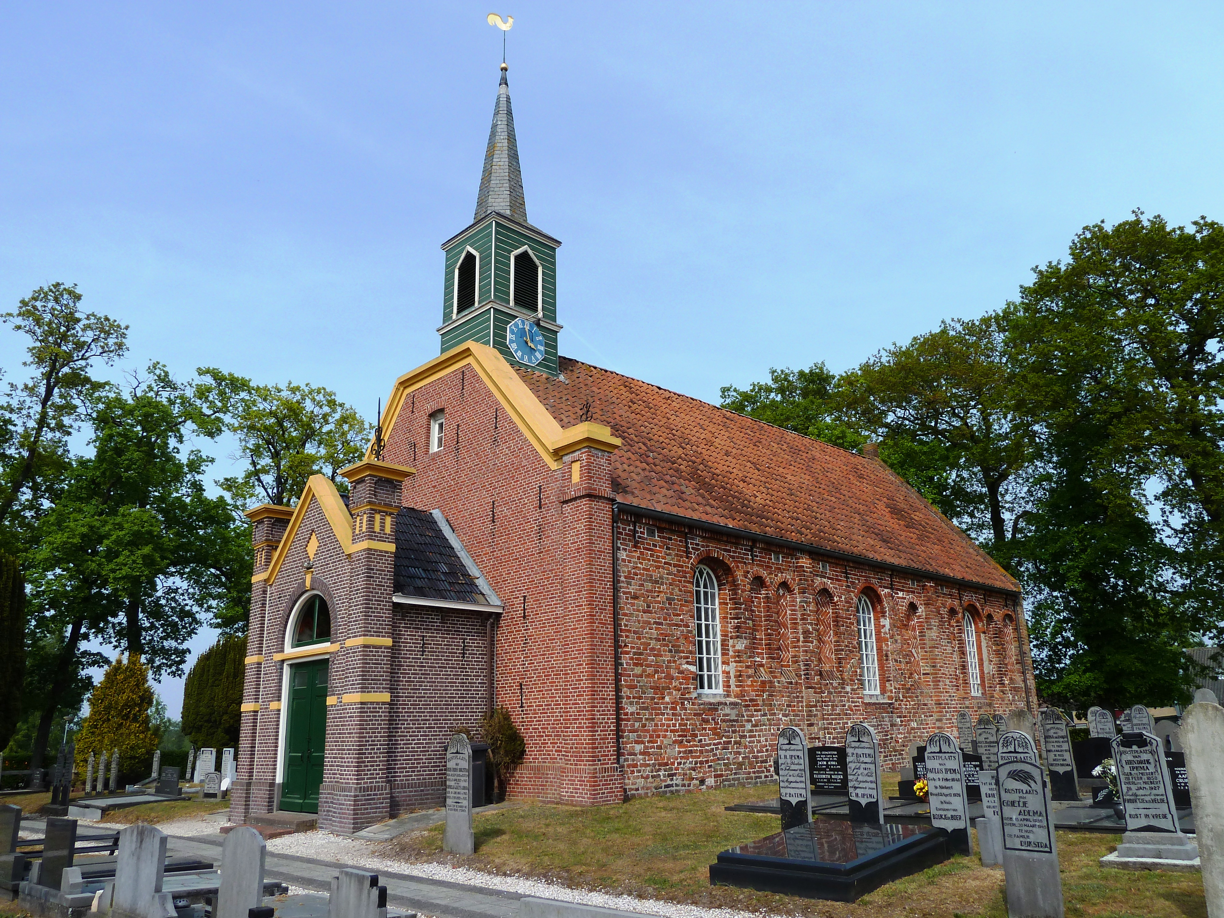 Hervormde kerk van Nuis (Marum, Groningen, Nederland).